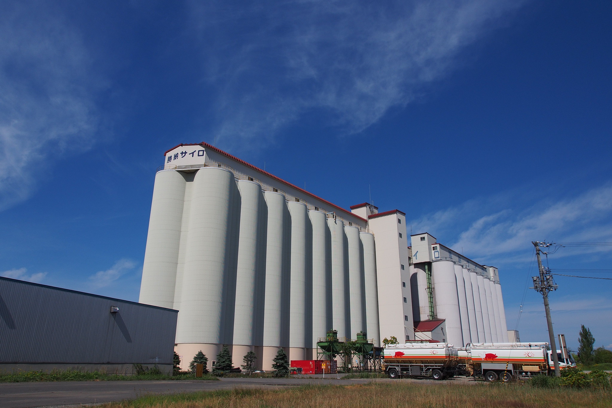 勝納サイロ（小樽市築港）